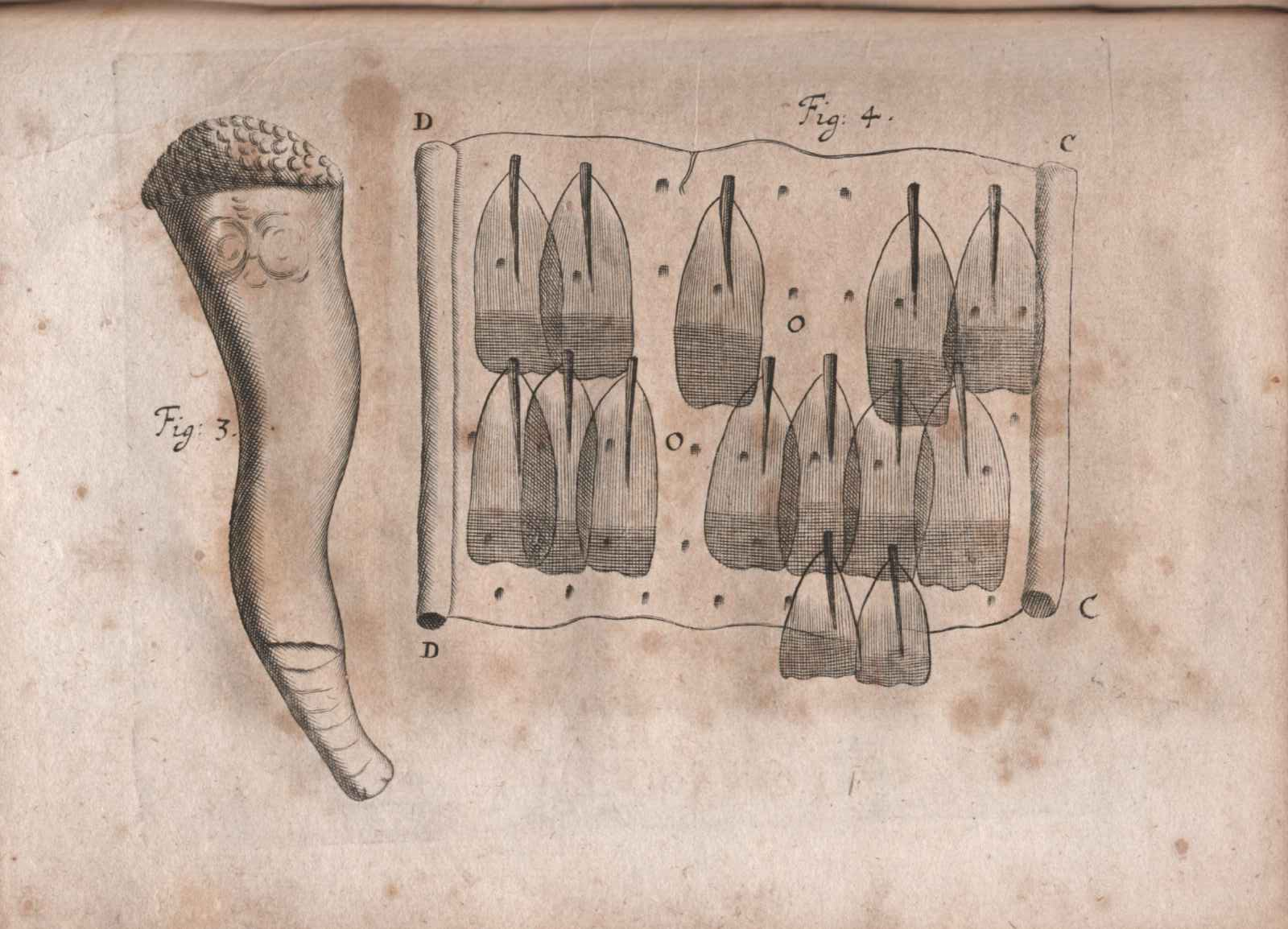 Illustration